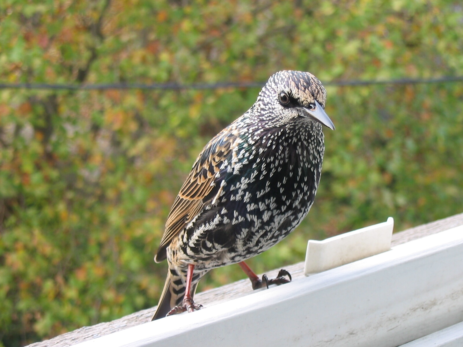 Étourneau Sansonnet à une fenêtre